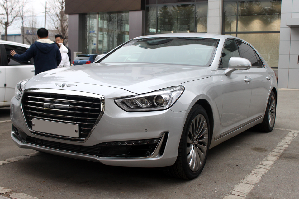 제네시스 EQ900 정측면